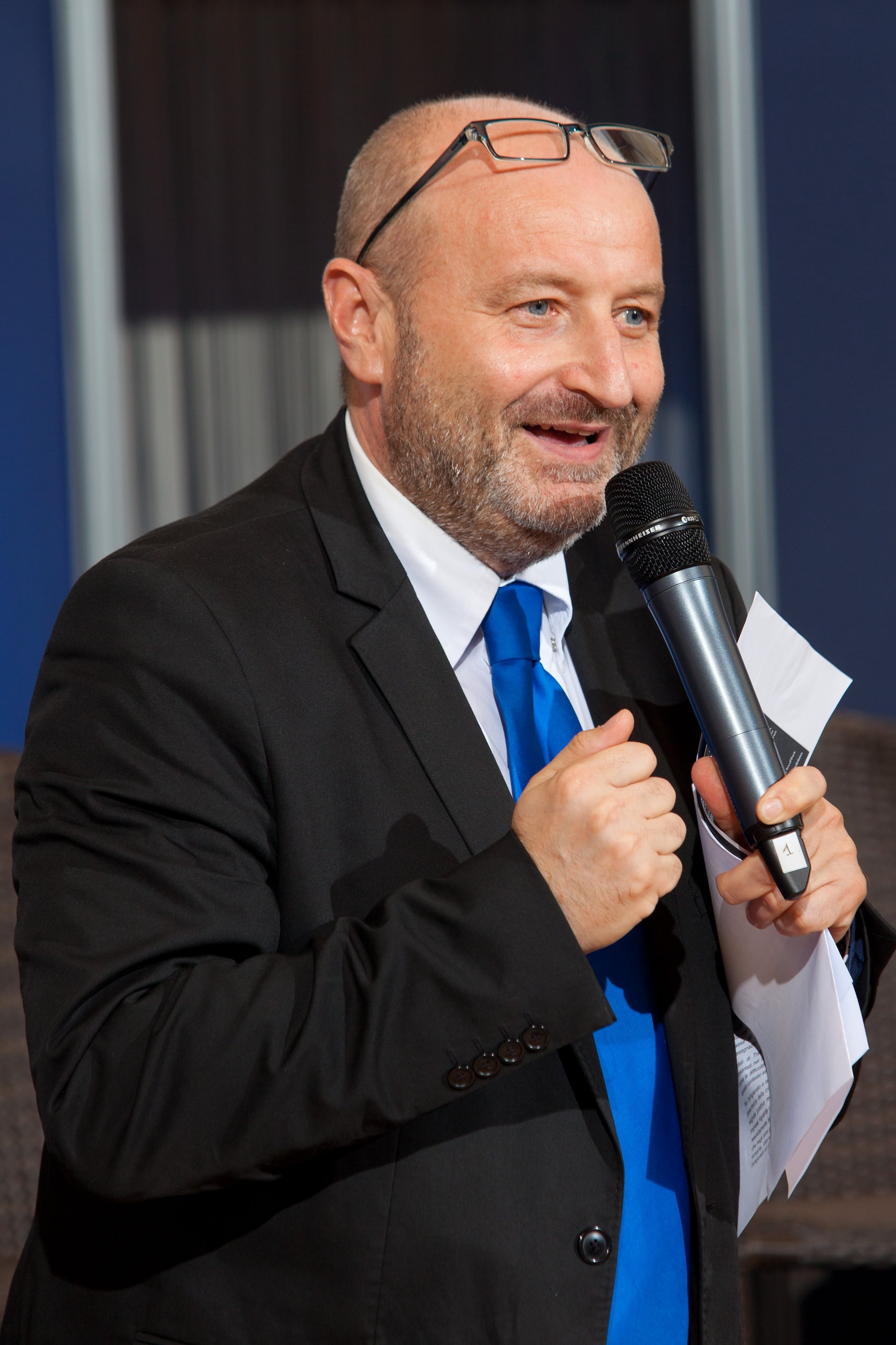 Fabrizio Binacchi, giornalista, scrittore e conduttore televisivo italiano.